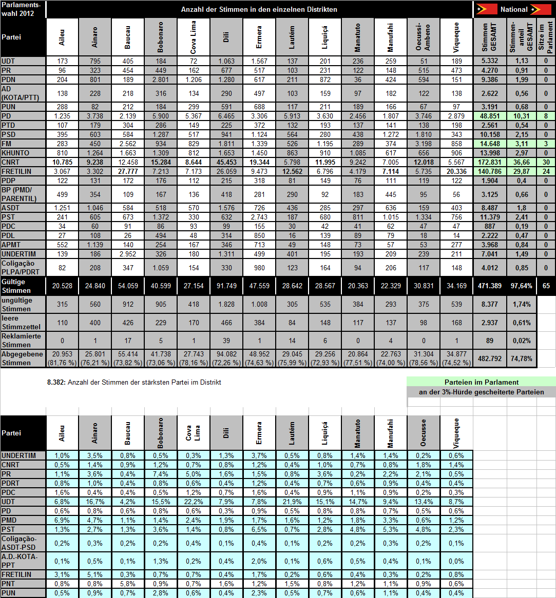 Ergebnis der Parlamentswahl 2012 in Osttimor nach Distrikte aufgeteilt